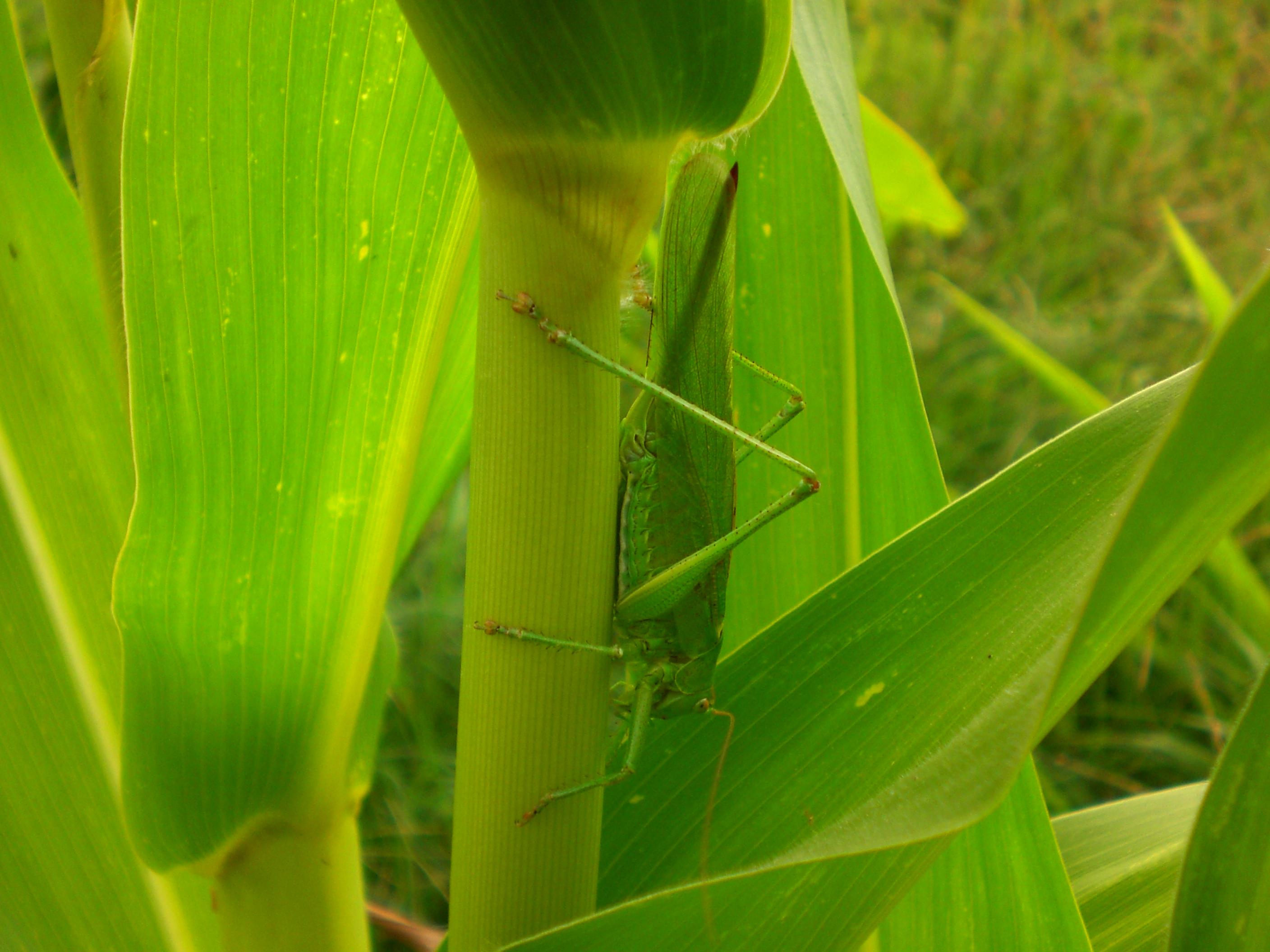 Un ortottero si mimetizza su una pianta di mais